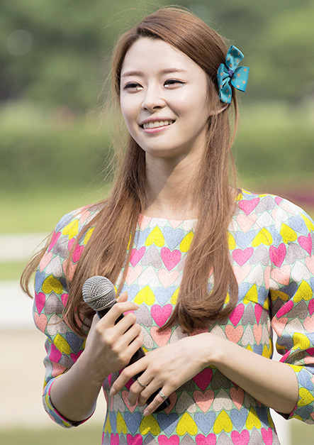 [13.06.30] 헬로비너스 직찍 서울경마장 by 심띵